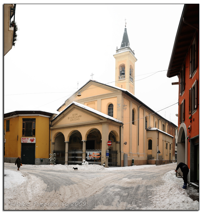 Chiesa di S. Rocco - Cuggiono